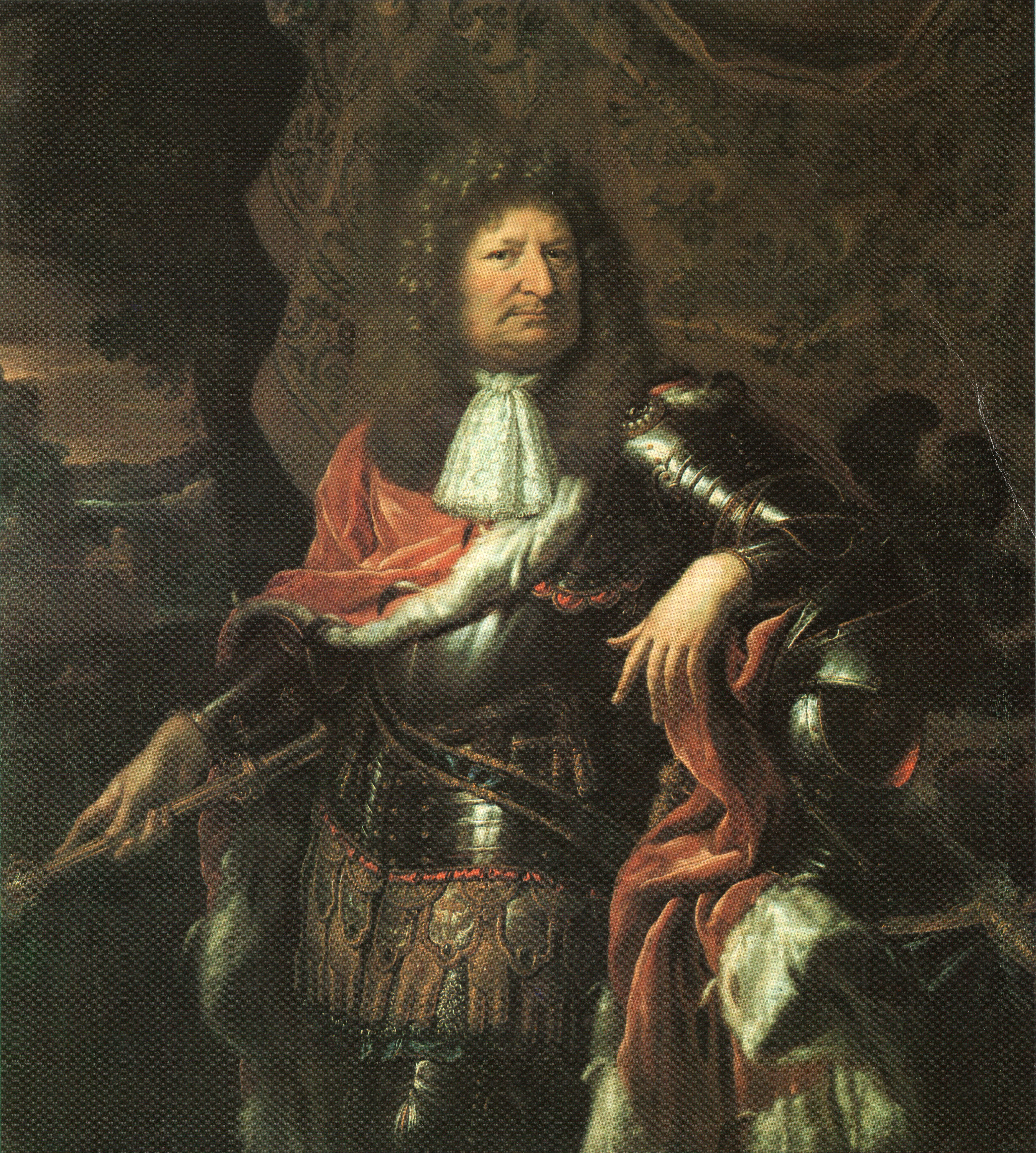 Friedrich Wilhelm von Brandenburg, der Große Kurfürst im Harnisch und Kurmantel.